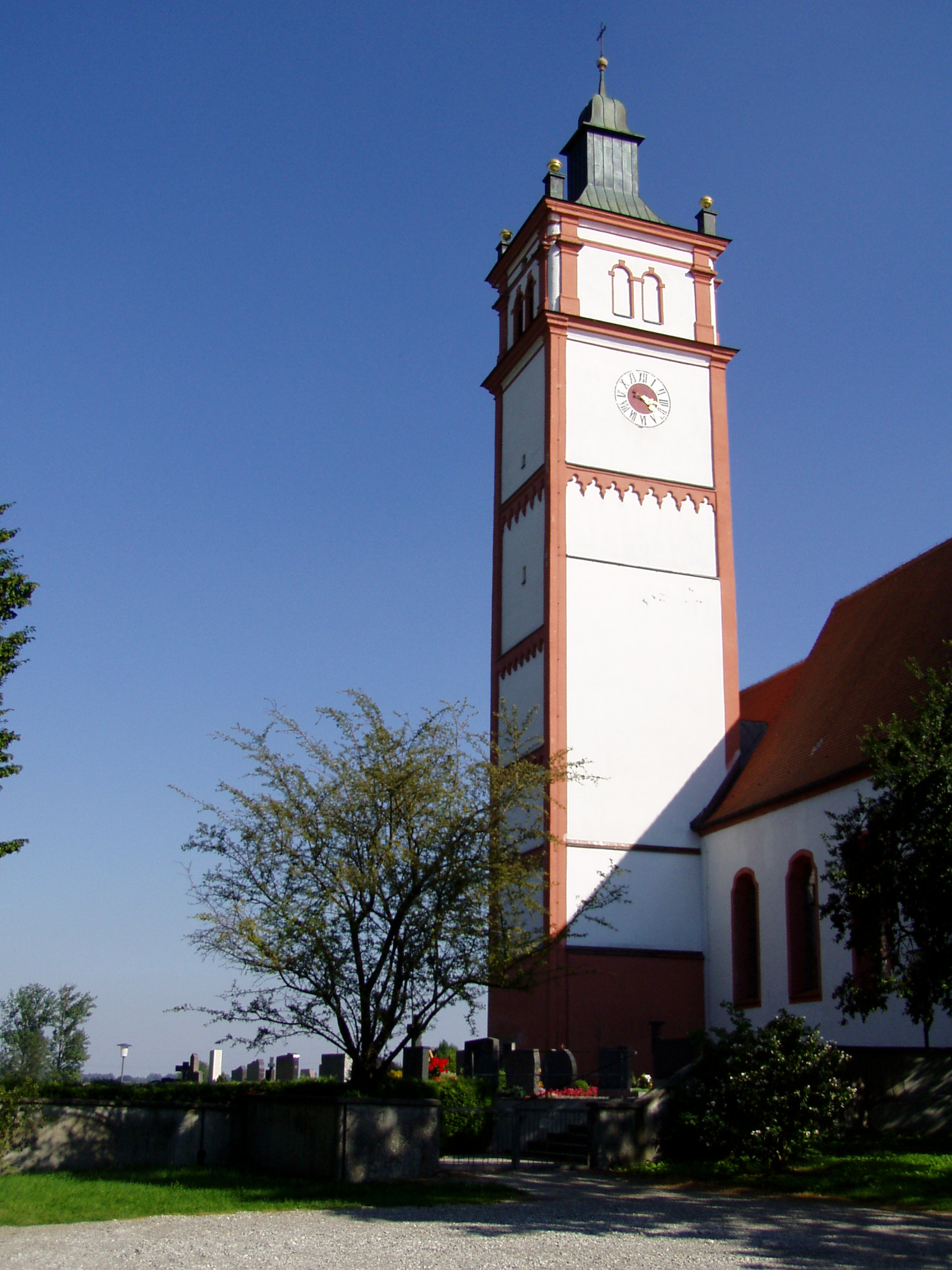 Kirche in Lamerdingen